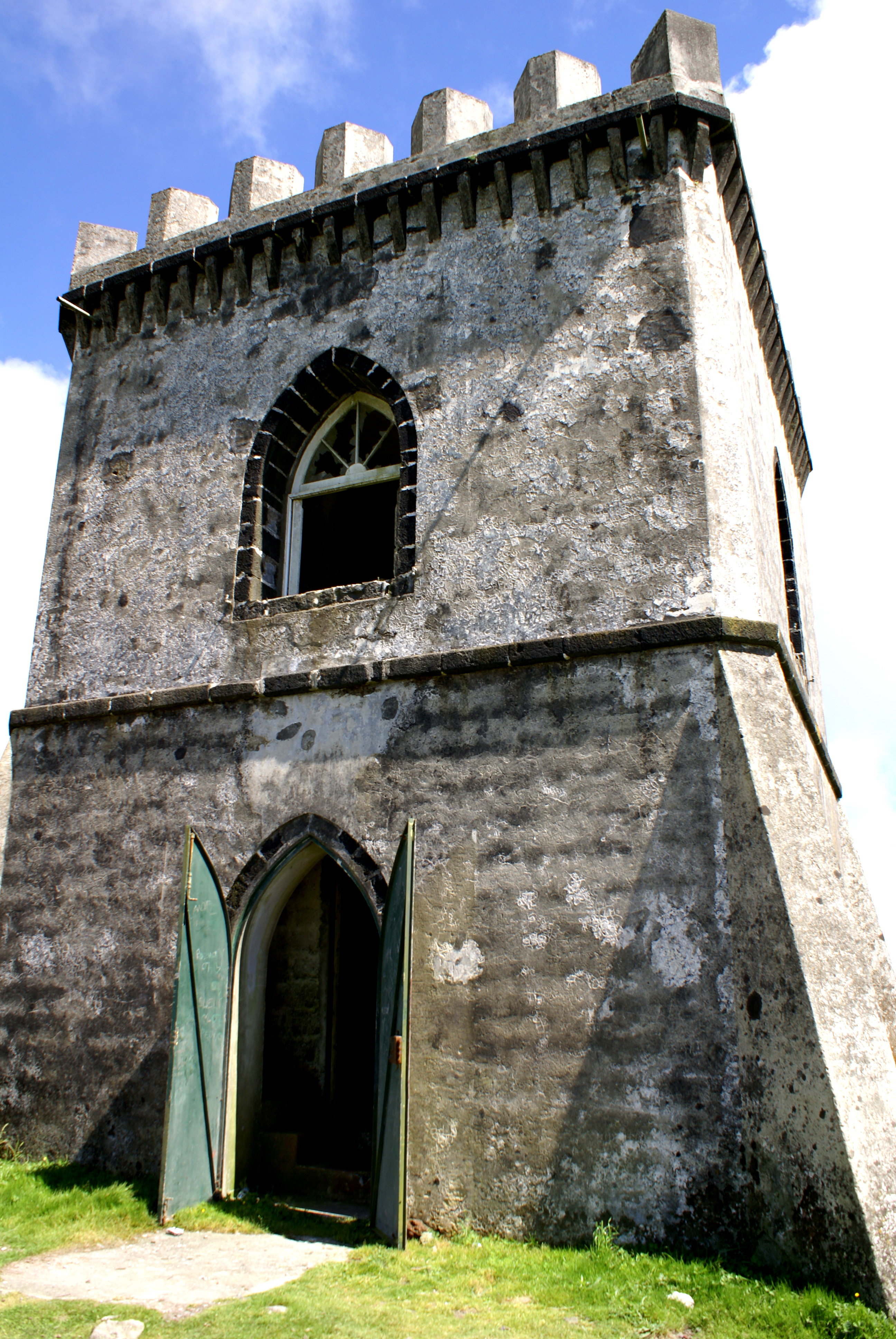 Castelo Branco, entrada, Vila Franca do Campo, ilha de São Miguel, Açores